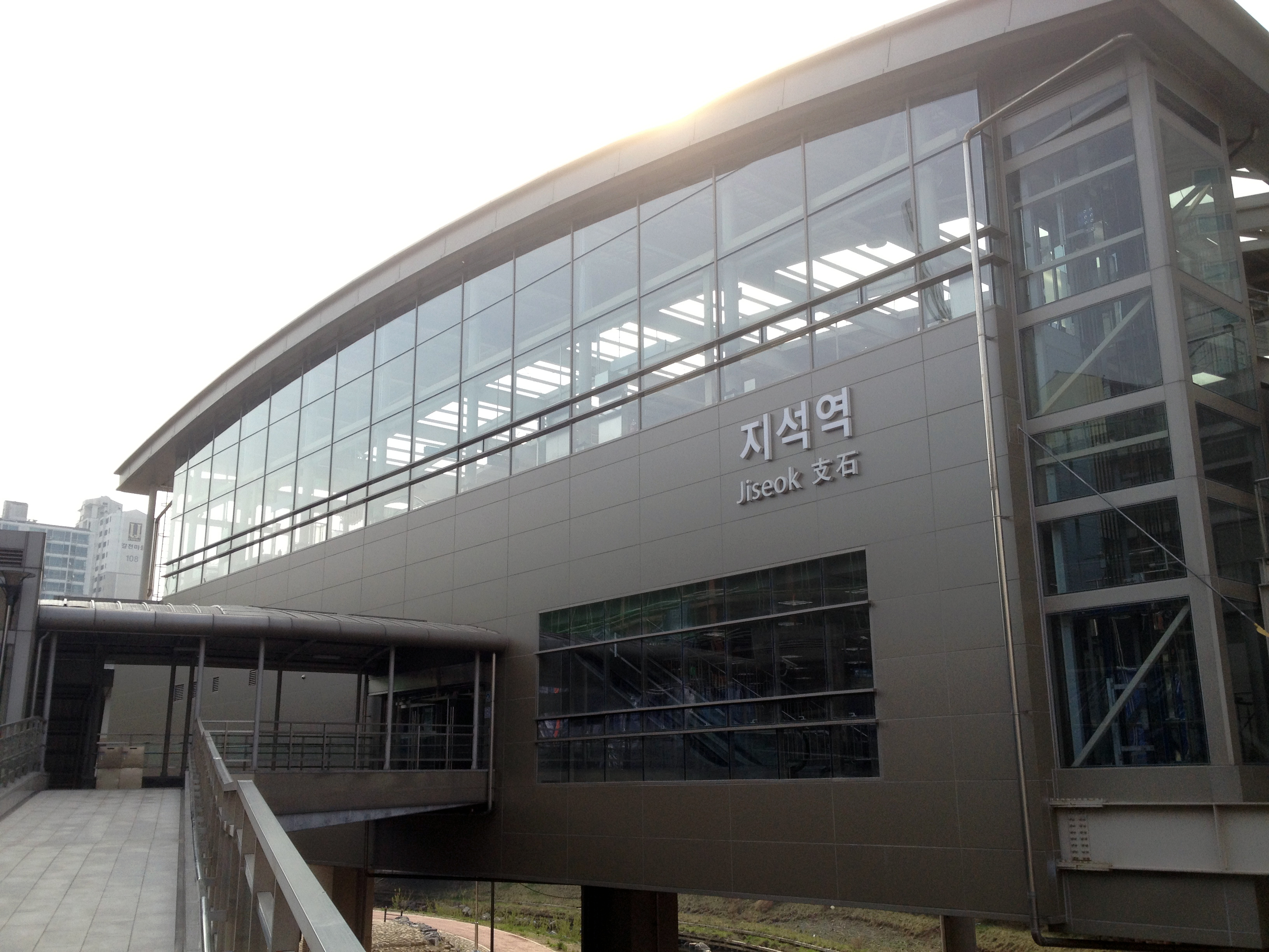 지석역 역사